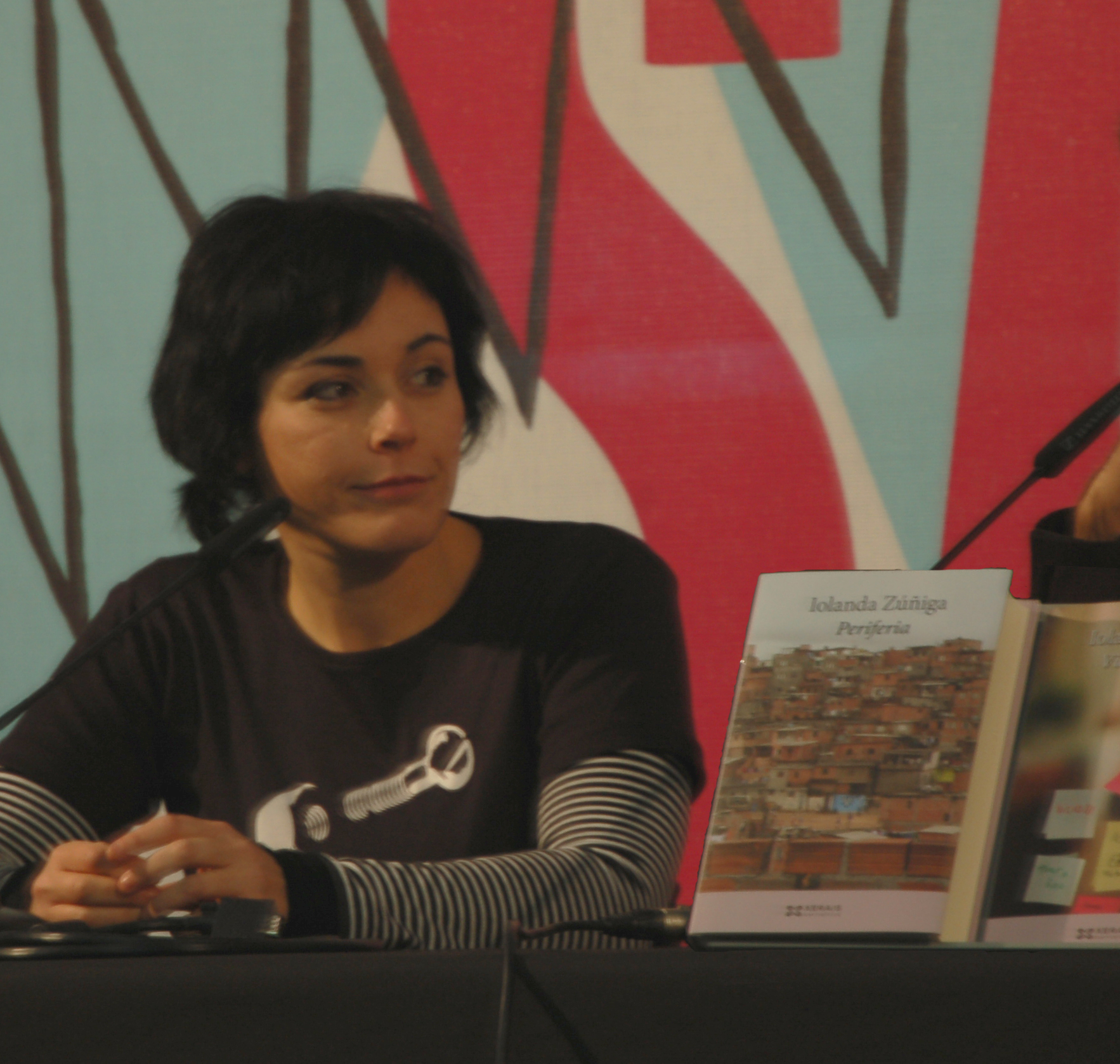 Iolanda Zúñiga presentando a súa novela Periferia, no CulturGal 2010 no Pazo da Cultura de Pontevedra